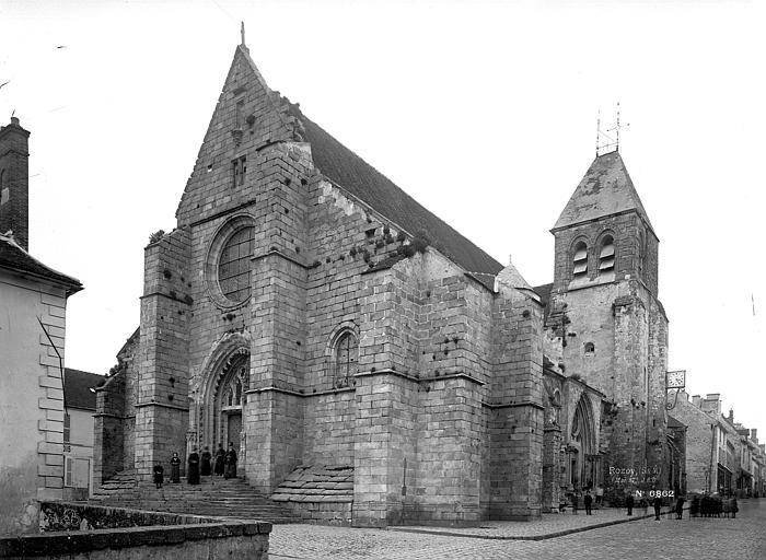 Ensemble sud-ouest